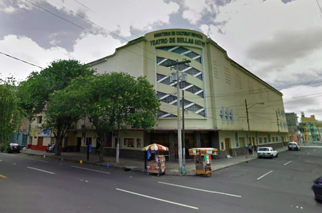 Teatro Bellas Artes Guatemala